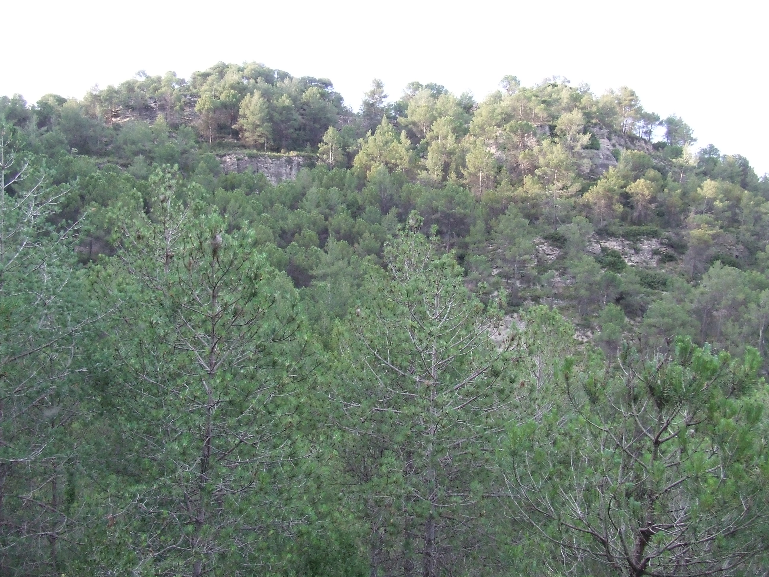 El Serrat de Brusa (Monistrol de Calders, Moianès)